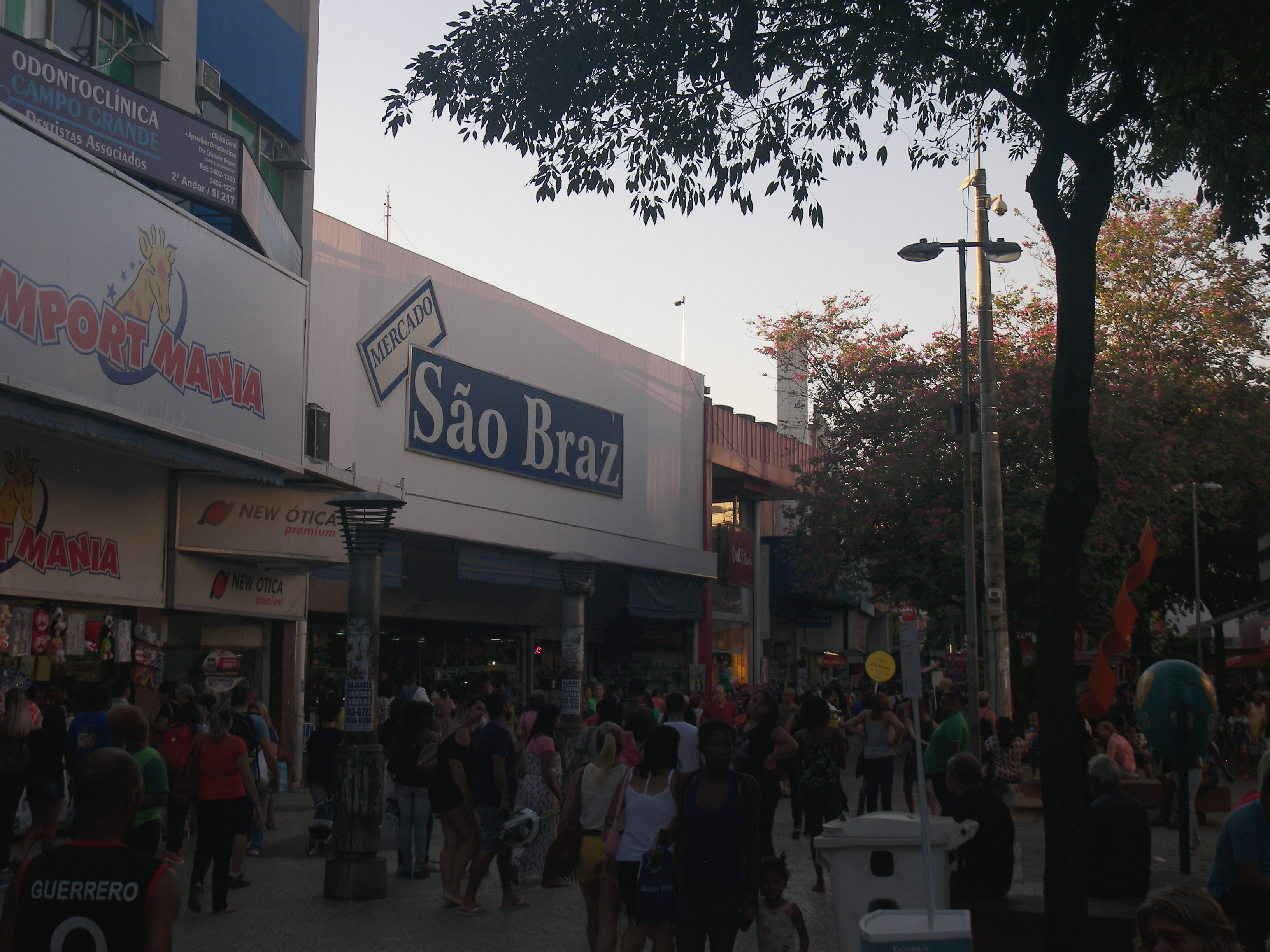 Mercado São Braz, Campo Grande, Rio de Janeiro.